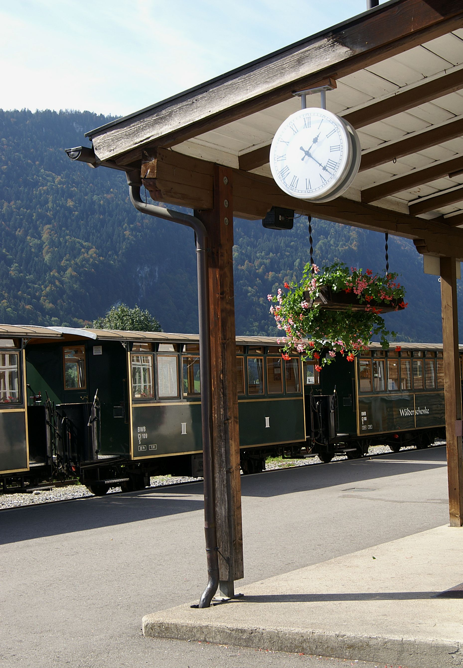 Bahnhof Bezau mit Museumsbahn "Wälderbähnle"